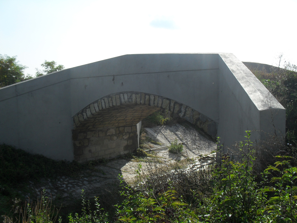 Laskó patak kőhídja This is a photo of a monument in Hungary. Identifier: 5640